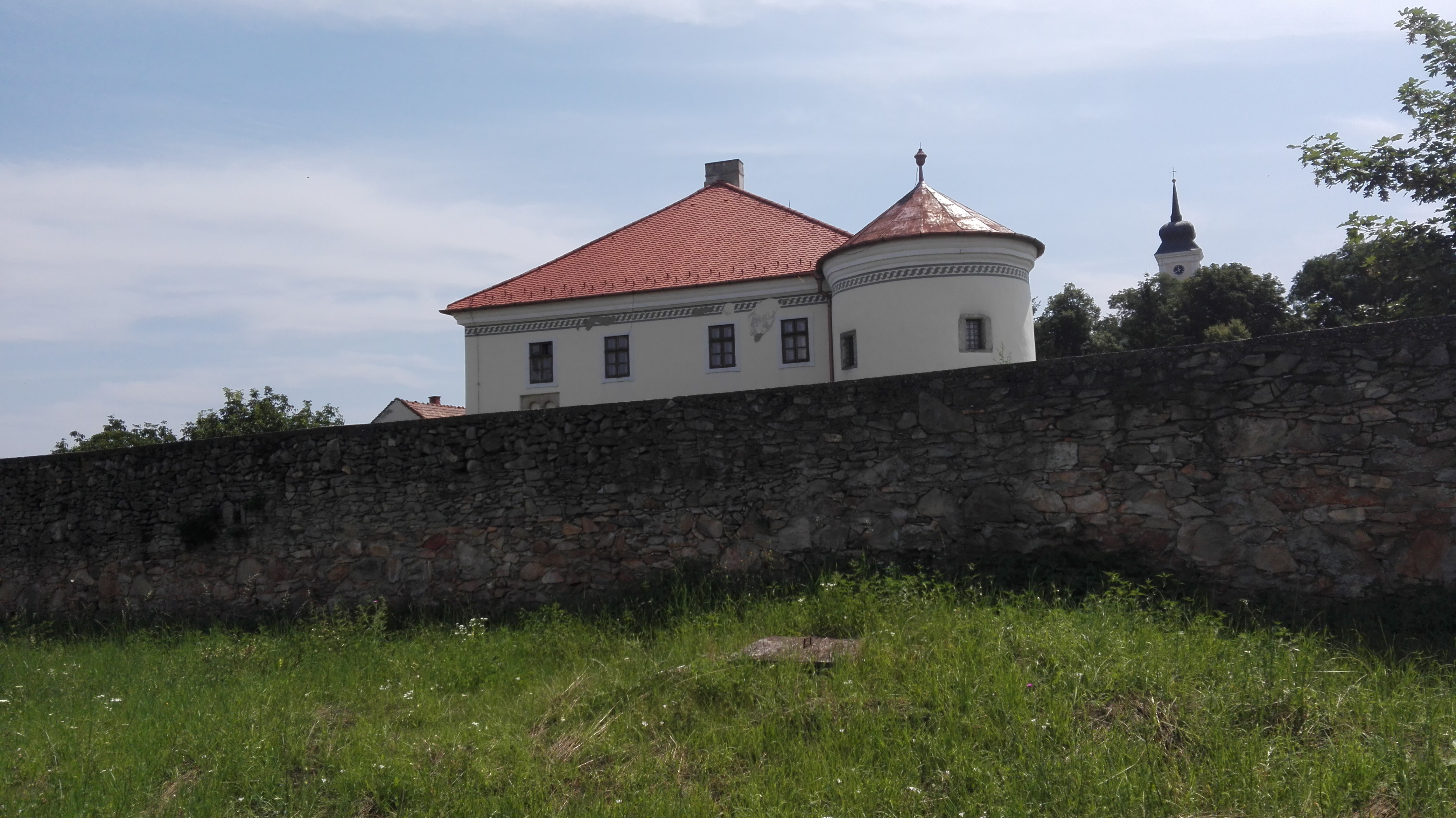 Monaky-kastély, Monok, Várfal